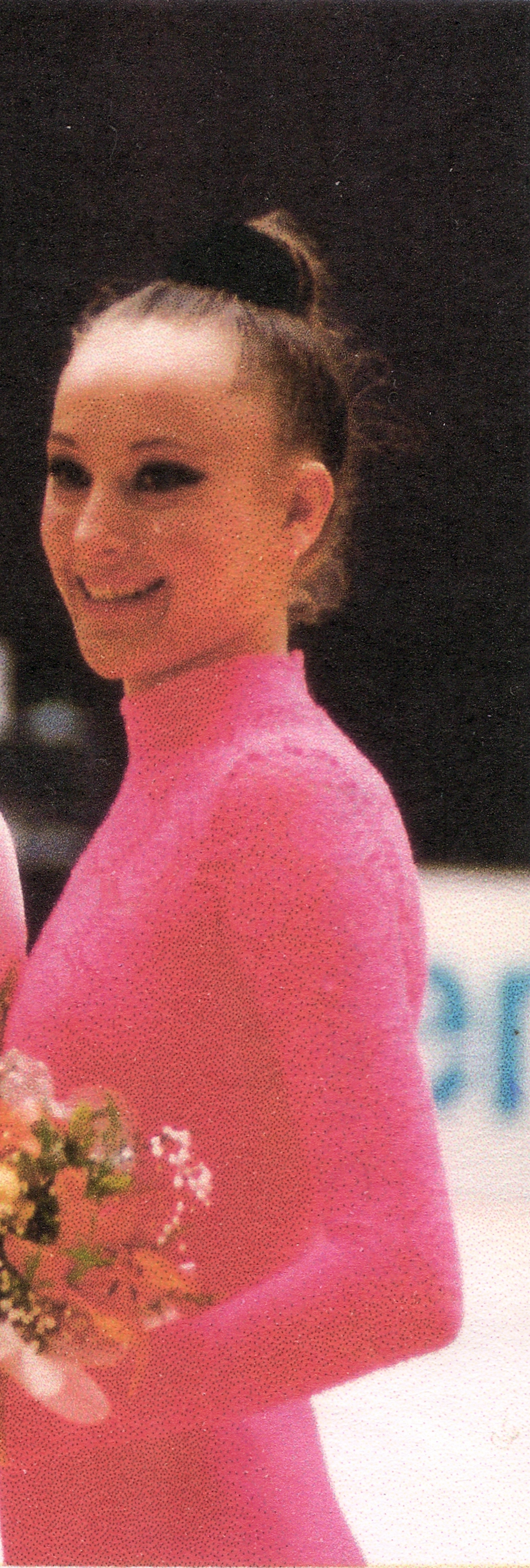 Amina Zaripova en el Mundial de Budapest en 1996.